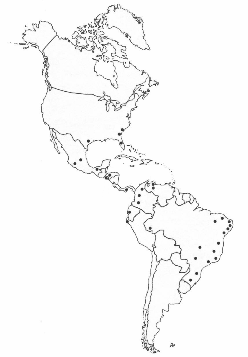 Distribución de Eremotherium laurillardi en las Américas (señalados con puntos negros) (modificado de Cartelle & De Iuliis, 1995).